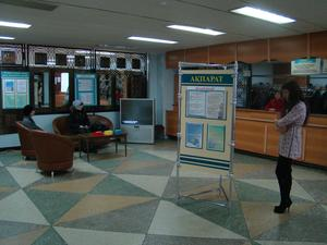 Отдел информации, регистрации и учета Костанайской ОУНБ им.Л.Н. Толстого